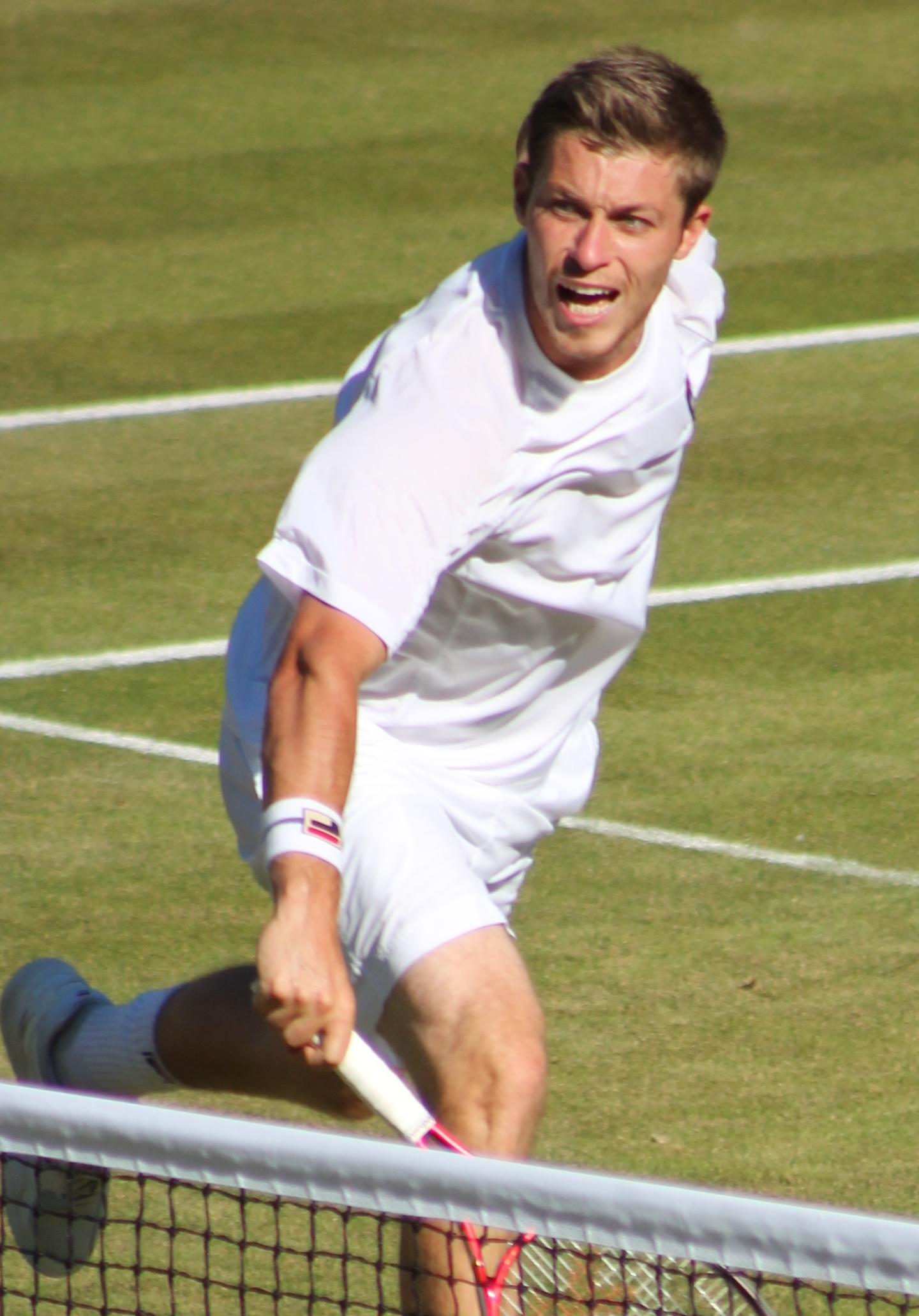 Skupski N. WM14 (15)